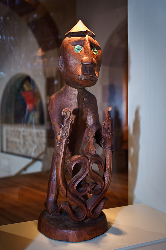 Oudste Korwar (A-564) Oldest korwar Korwar figures serve to keep the surviving relatives in contact with their deceased ancestors and thus always able to secure their powerful blessings. They serve as a medium of communication between the living and the dead. Korwars may be standing or squatting figures. The heads are large in relation to the highly abstract bodies; the chin is usually straight, horizontal, and broad; and the nose is the most prominent facial feature.